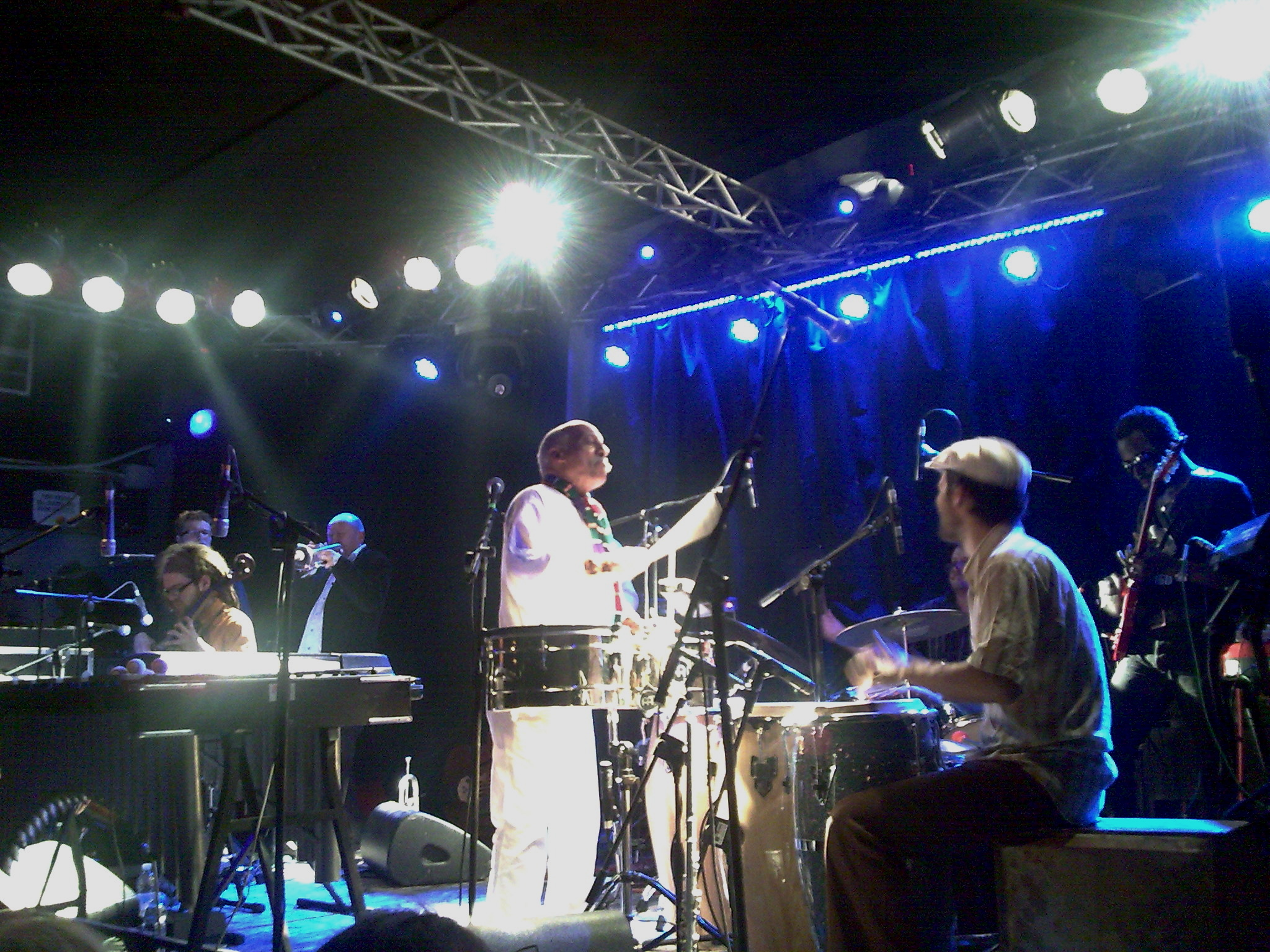 Mulatu Astatke en concert avec The Heliocentrics le 9 mars 2009 au Circolo degli Artisti à Rome